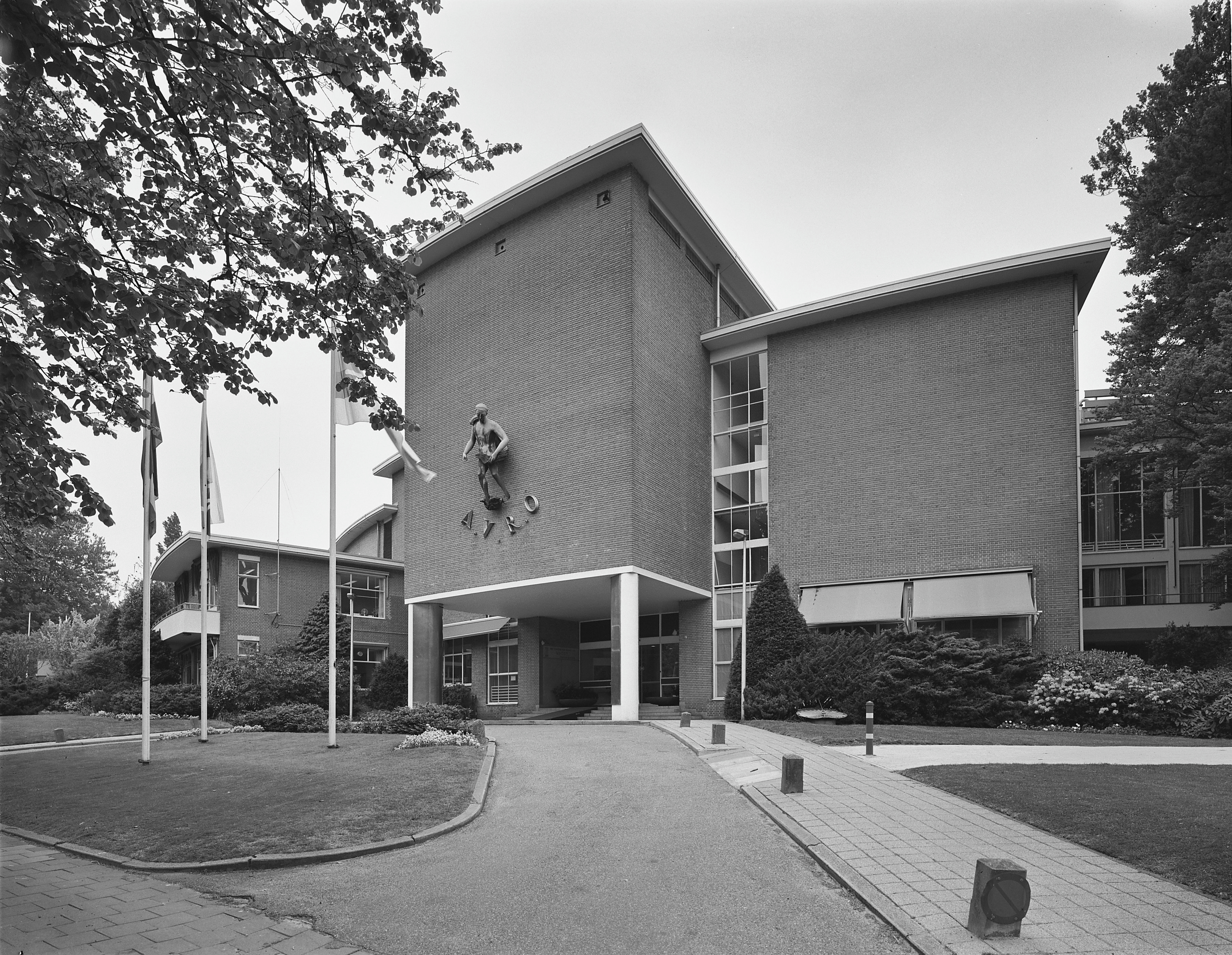 AVRO STUDIO: Exterieur VOORGEVEL (opmerking: Gefotografeerd voor MIP Noord-Holland)